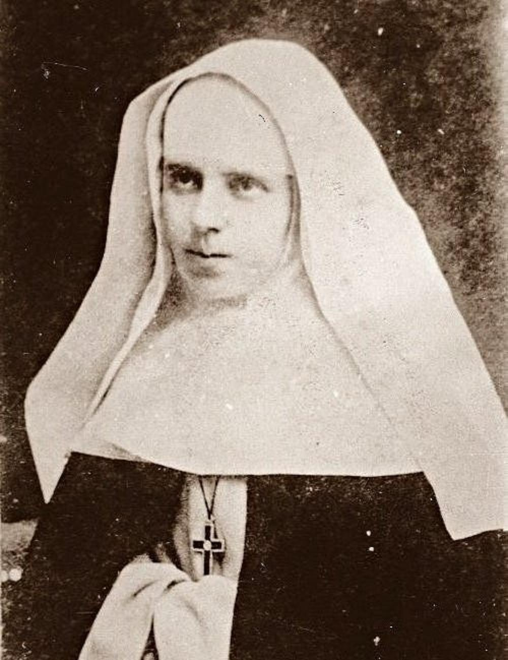 fotografia Róży Kolumby Białeckiej